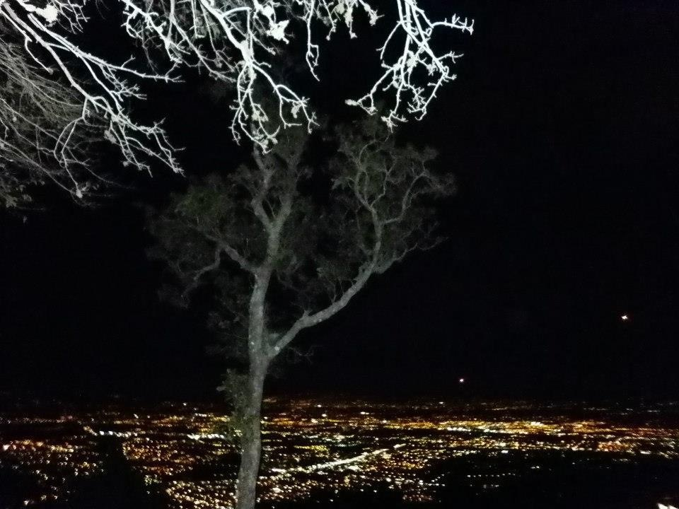 En los cerros de Escazú, vista nocturna de Santa Ana.